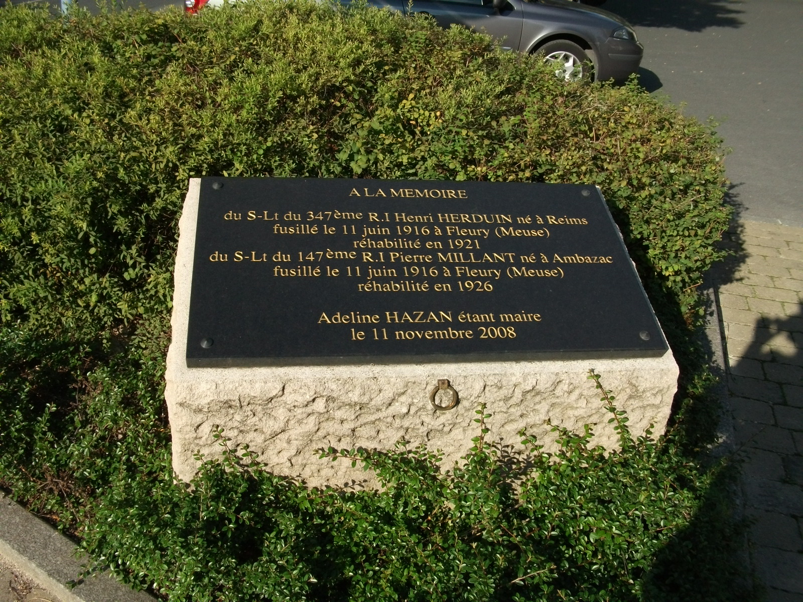 en mémoire des soldats de la première guerre mondiale qui furent réhabilités. Henri Herduin et Pierre Millant à Reims.